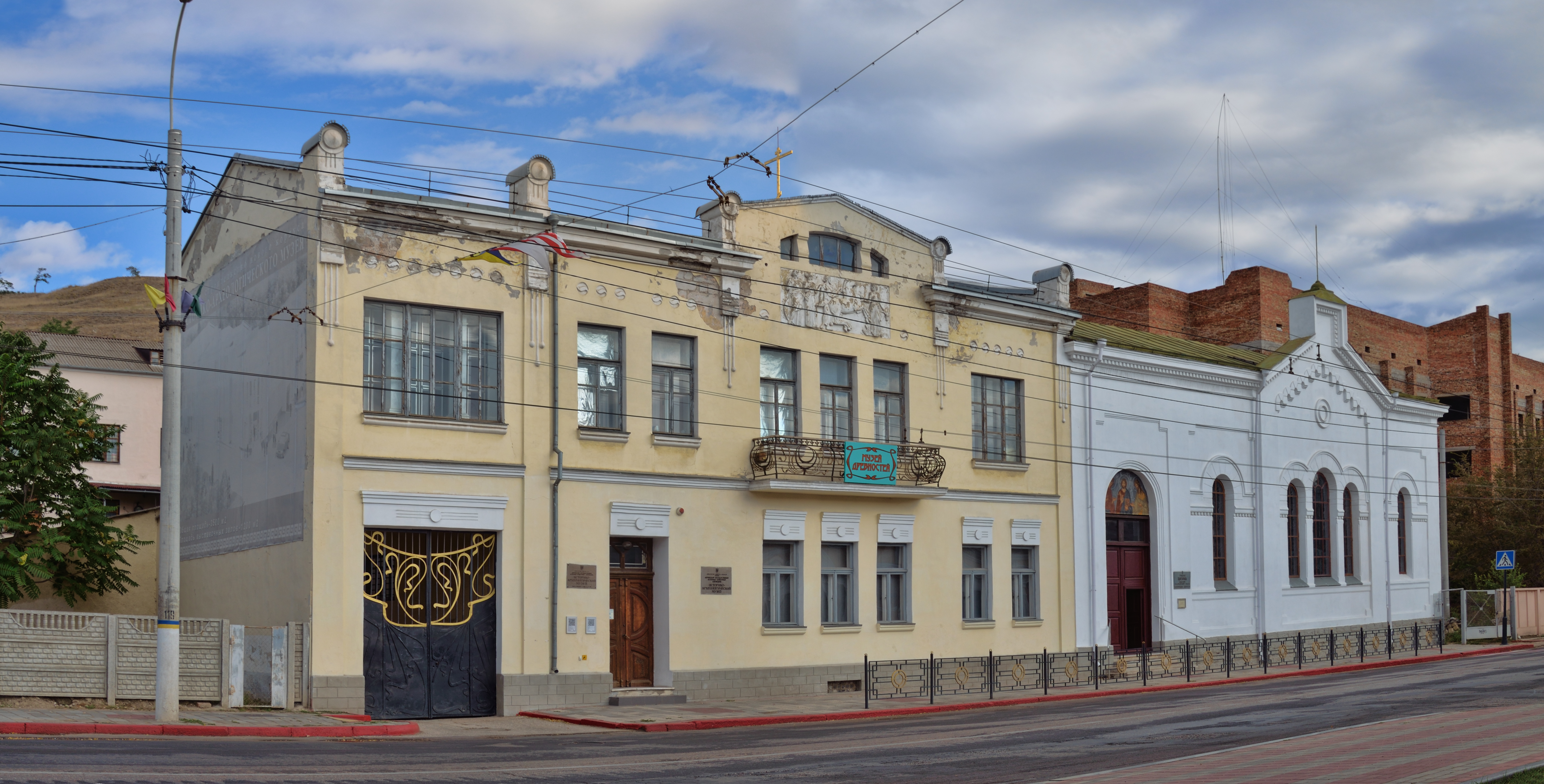 Будинок Месаксуді, Керч, вул. Свердлова, 22, літер «А», «Б»